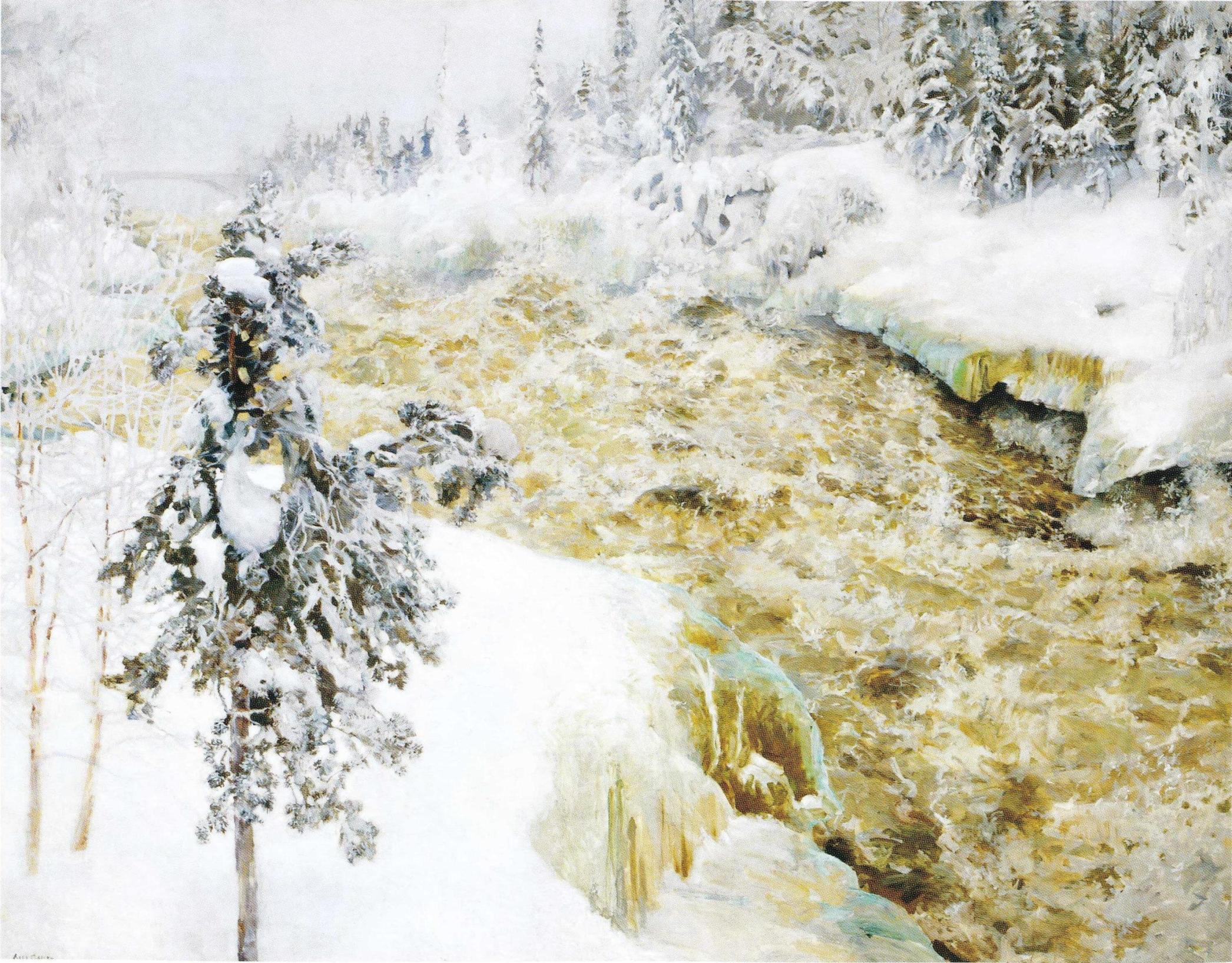 Akseli Gallen-Kallelan maalaus Imatra talvella.